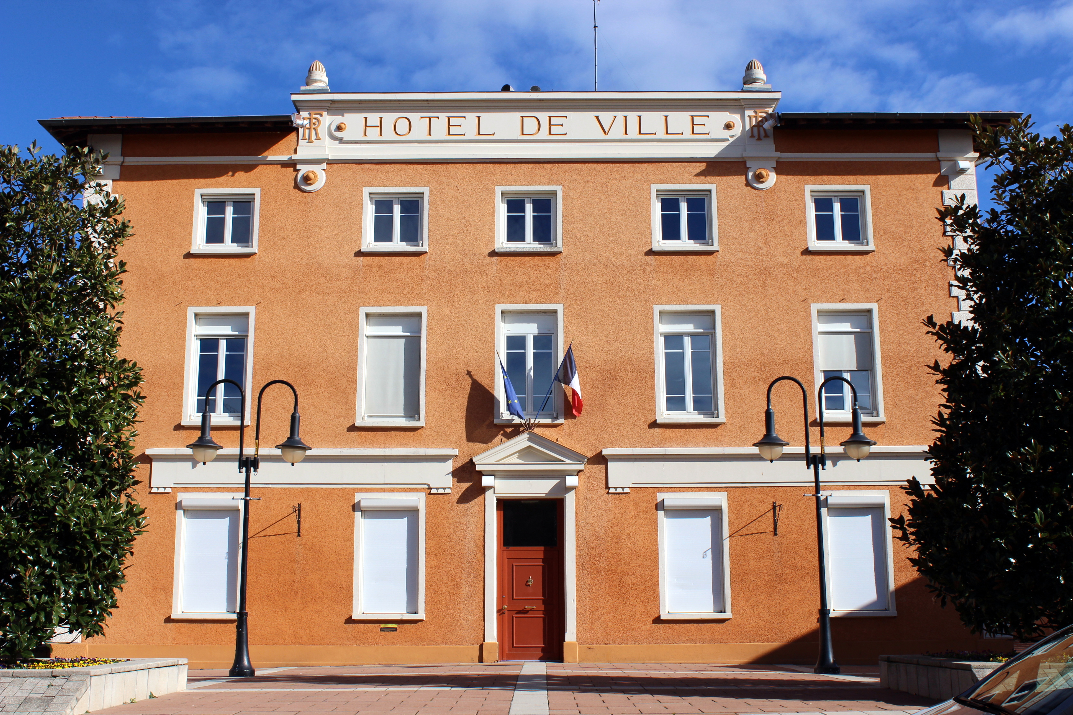 Hotel de ville de Saint-Quentin-Fallavier.